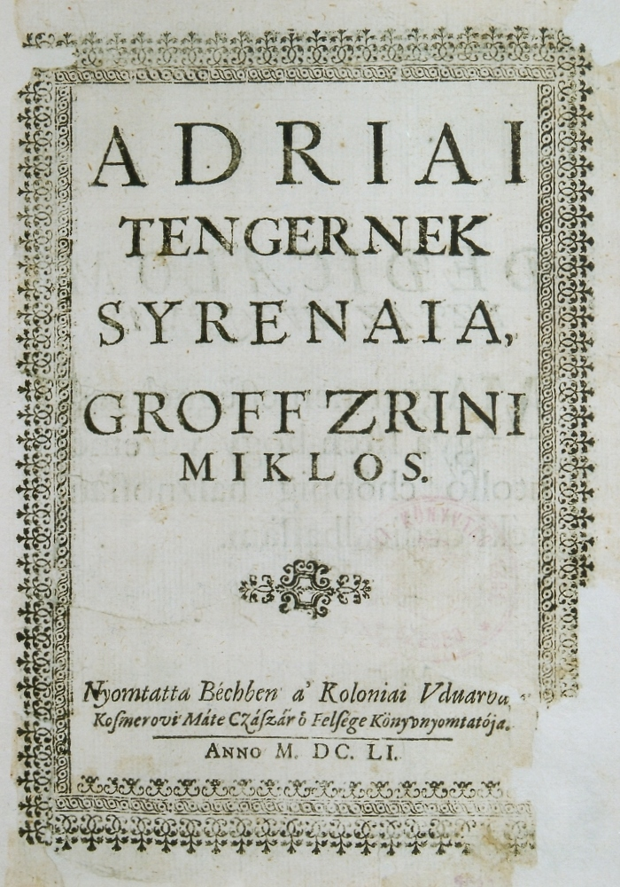 Groff Zrini Miklos: Adriai tengernek Syrenaia - Zrínyi Miklós hősi eposza, a Szigeti veszedelem is ebben a könyvben jelent meg. A kötet a verses eposzon kívül Zrínyi lírai verseit is tartalmazta.